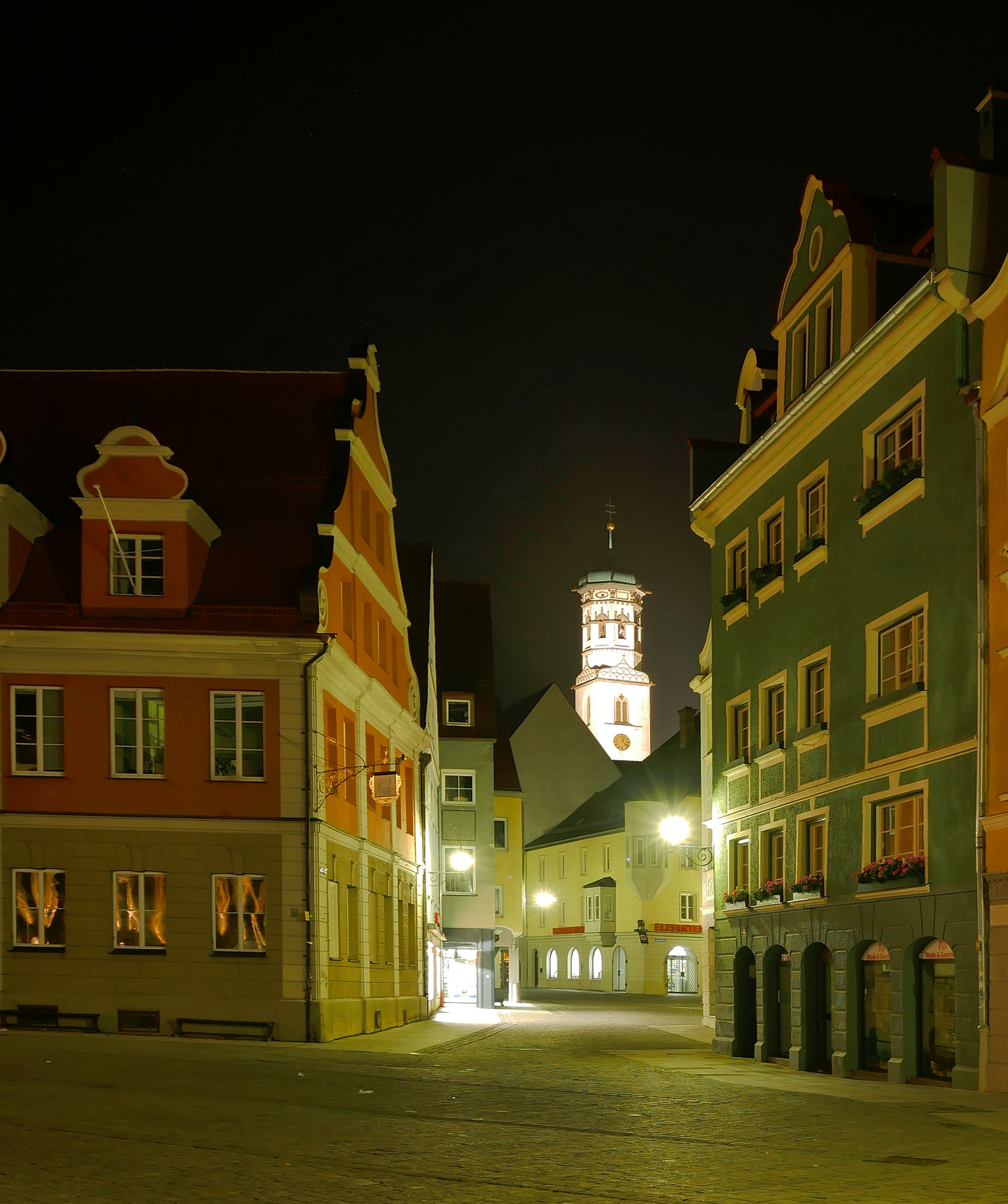 Kalchstraße in Memmingen um Mitternacht vom Marktplatz aus gesehen. Im Hintergrund der Turm der (ehemaligen) Kreuzherrenkirche.